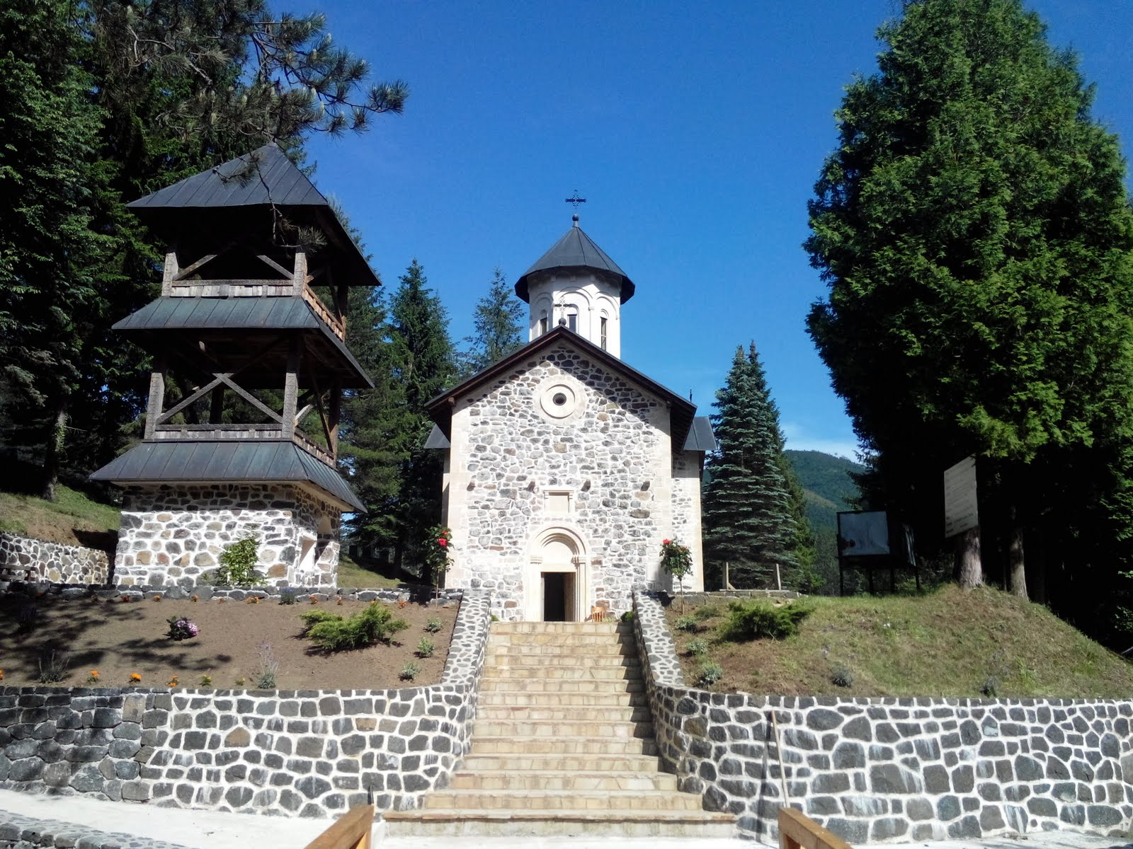 Манастир Свете Тројице или манастир Возућа или Возућица је манастир Српске православне цркве у Митрополији дабробосанској. Посвећен је Светој Тројици. Манастир се налази у Возући, у долини ријеке Криваје и подножју планине Озрен. Изграђен је у 14. вијеку као задужбина српског краља Драгутина